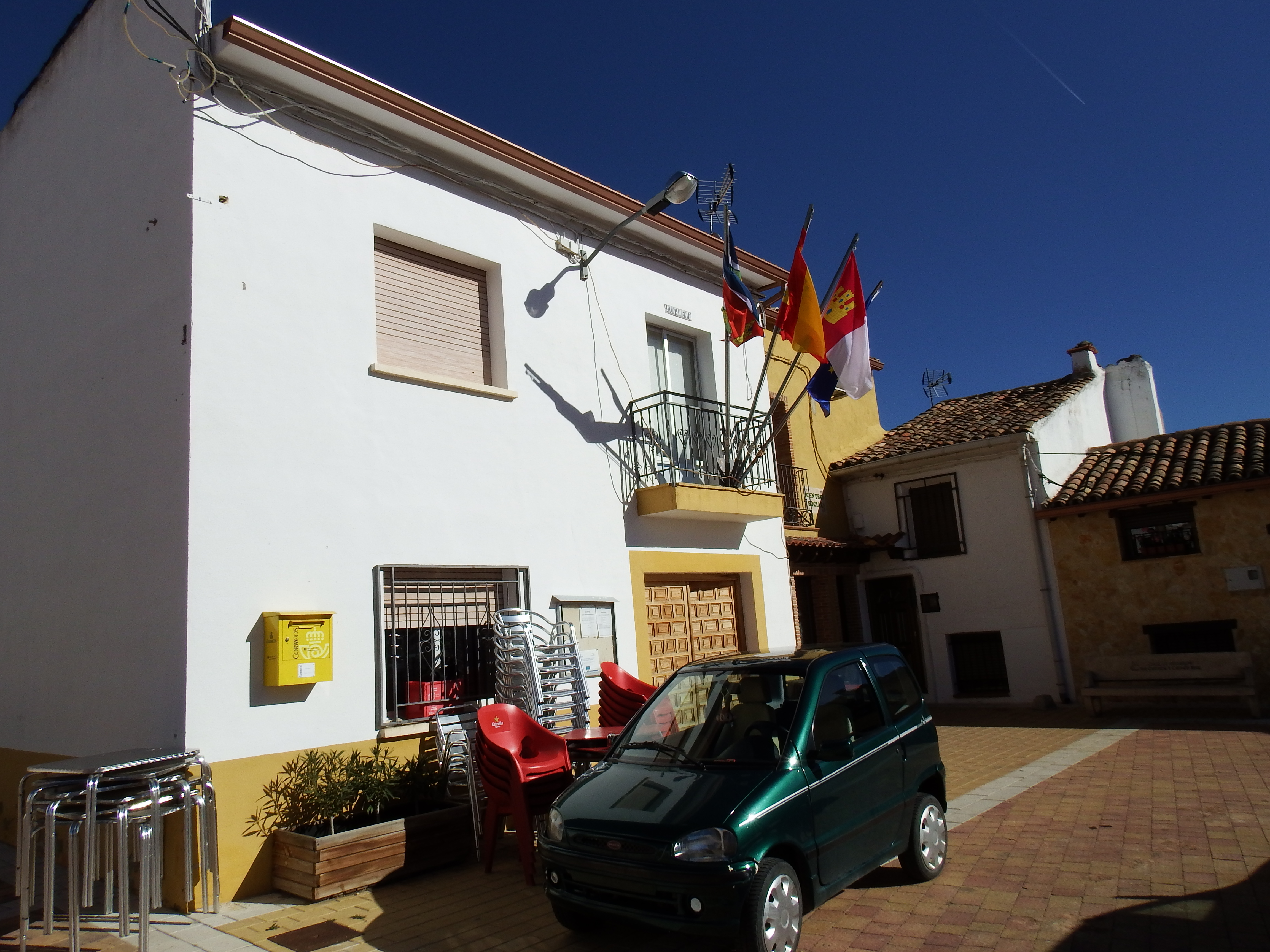 Ayuntamiento de Yémeda